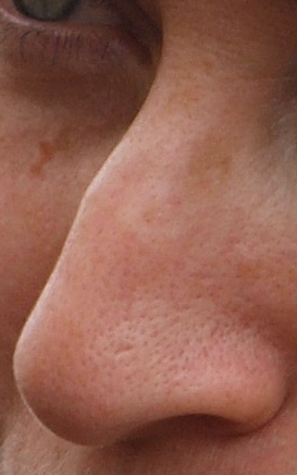 Human nose (Russian woman)